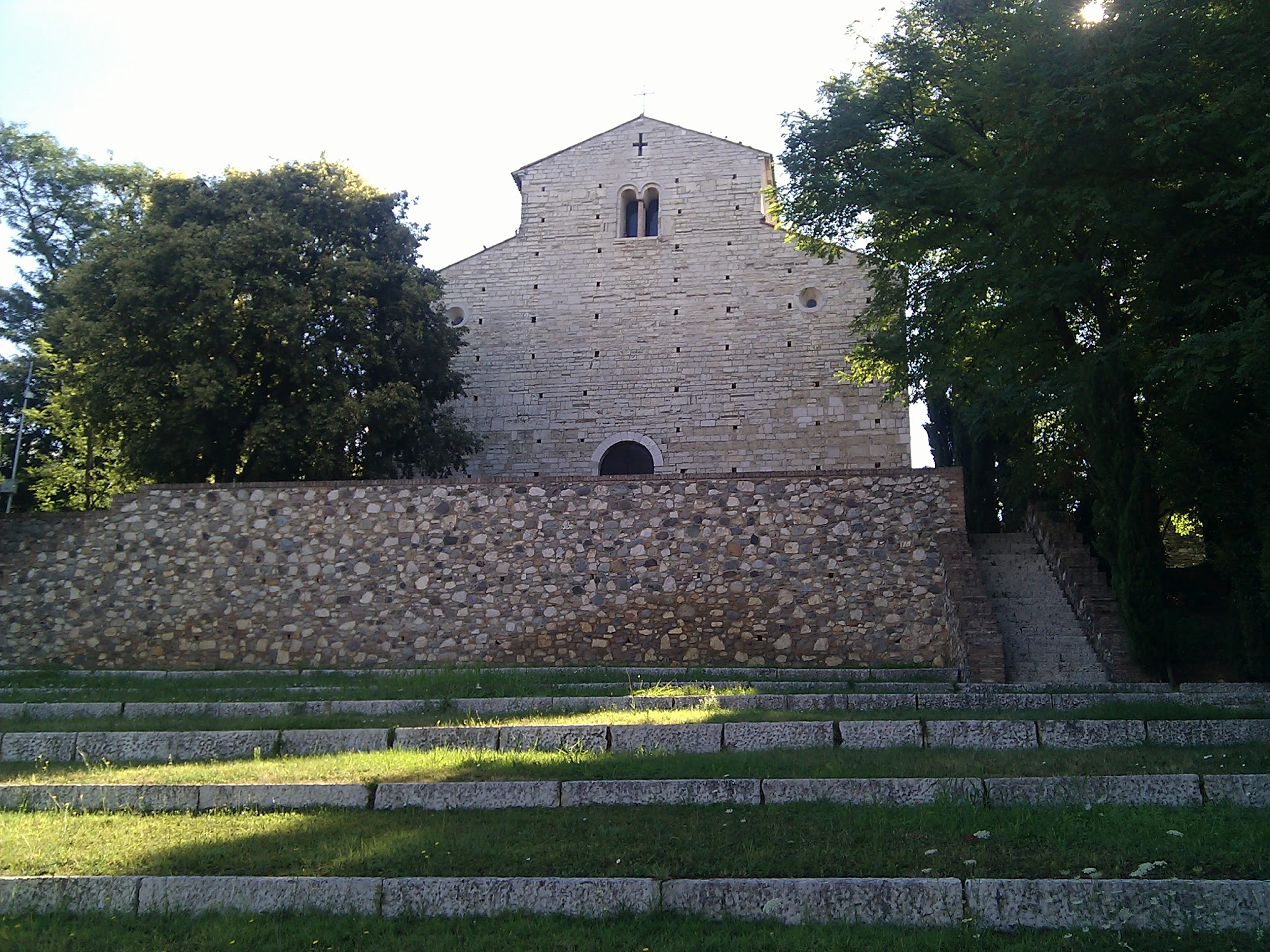 Chiesa di San Pancrazio - Facciata - Montichiari